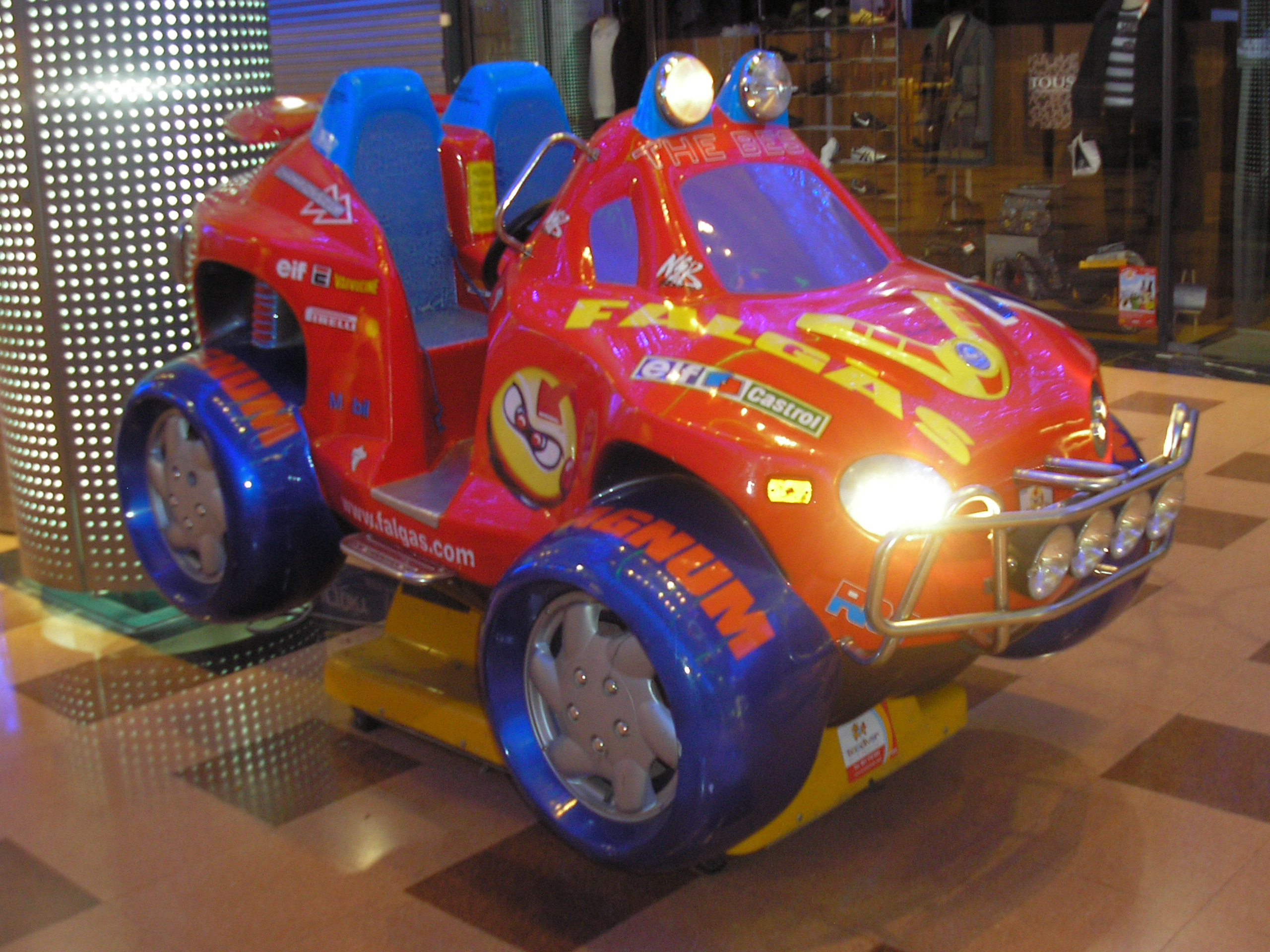 Coche de juguete Barcelona,España.